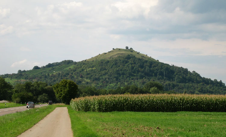 Limburg bei Weilheim an der Teck, Baden-Württemberg. Der Kegel Limburg ist der Rest eines ehemaligen Schwäbischen Vulkans.